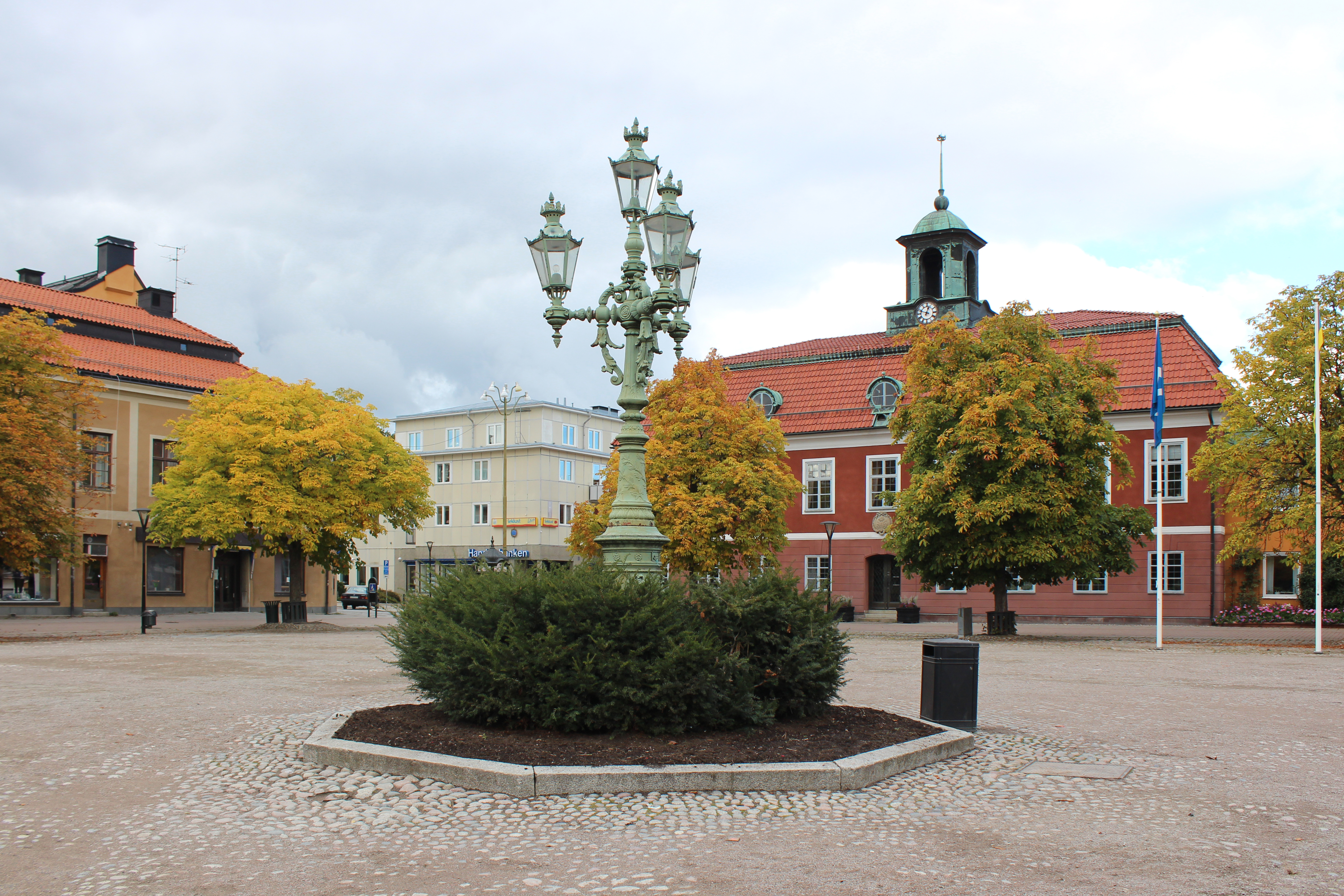 RÅDHUSET, SALA